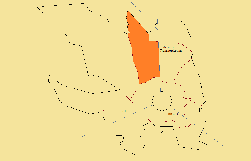 Distrito Maria Quitéria em cor laranja, em Feira de Santana, Bahia, Brasil.